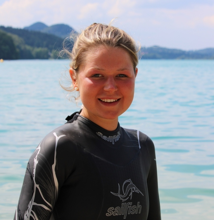 Open Water Training in Fuschl am See